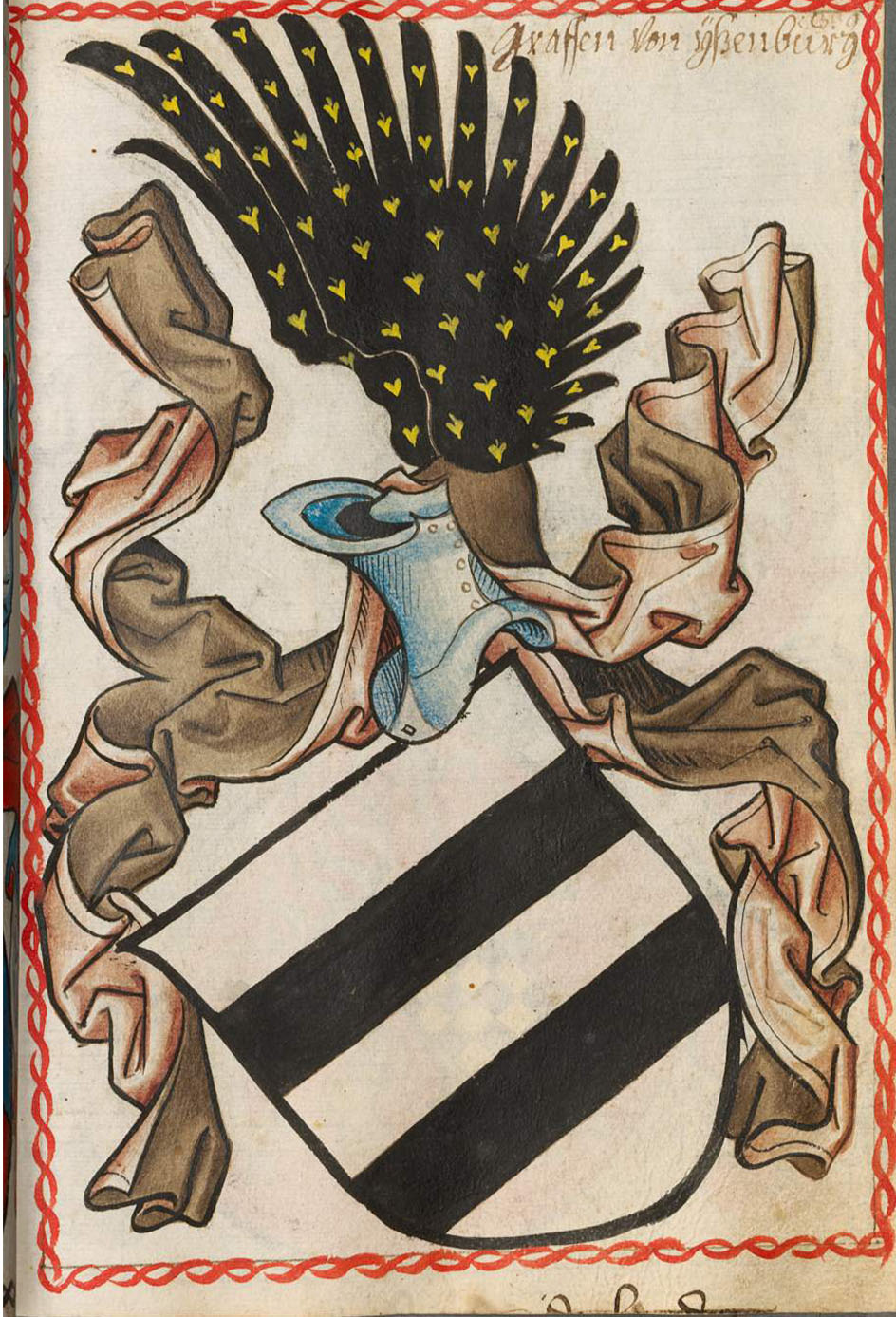 Scheibler'sches Wappenbuch , älterer Teil Grafen von Isenburg